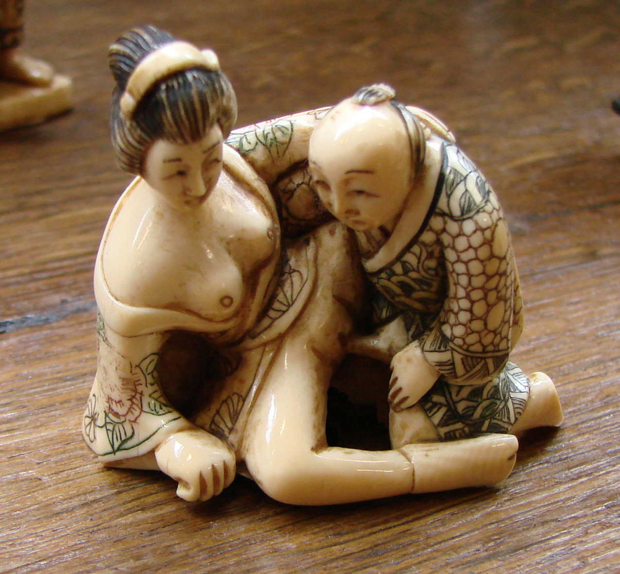 Statuette érotique en ivoire (Hauteur:6 cm).